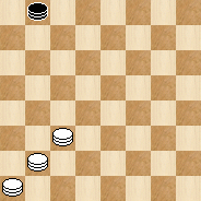 Диаграмма начального положения способа треугольник Петрова из книги Педро Руиза Монтеро 1591 года.